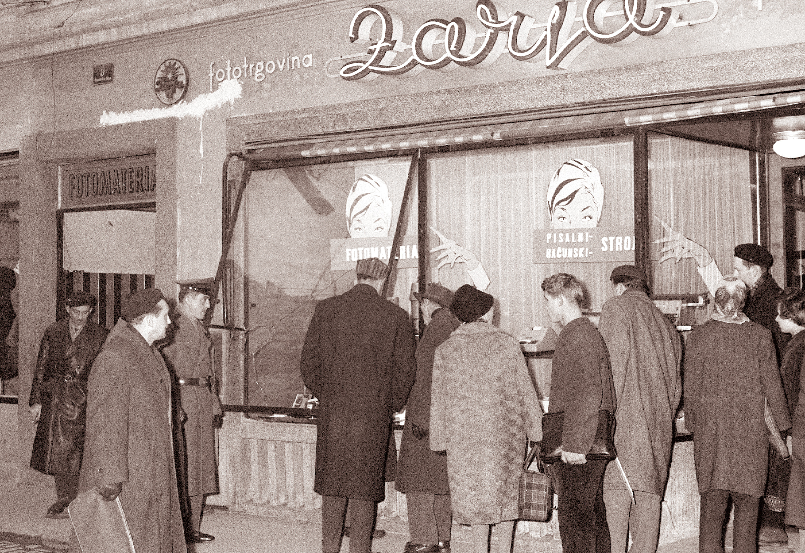 Prodajalna Zarja v Gosposki ulici po ropu